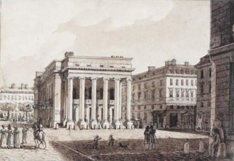 "Théâtre Favart, vu de la rue Grétry." Dessin à la plume et lavis à l'encre brune, 5,5 x 8 cm, par Christophe Civeton (1796-1831), en provenance de la collection Hippolyte Destailleur.